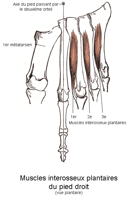 Muscles interosseux plantaires. Anatomie humaine